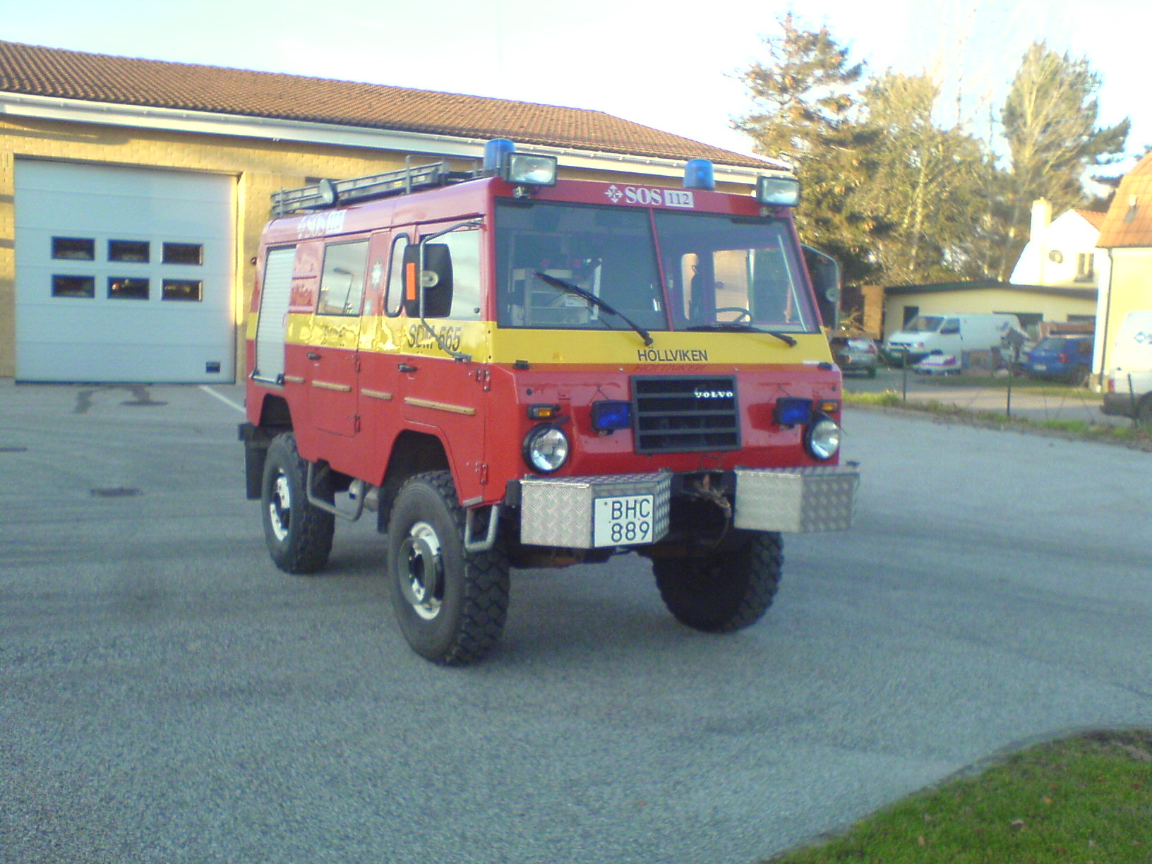 Volvo C303 as firetruck, in Höllviken, Sweden